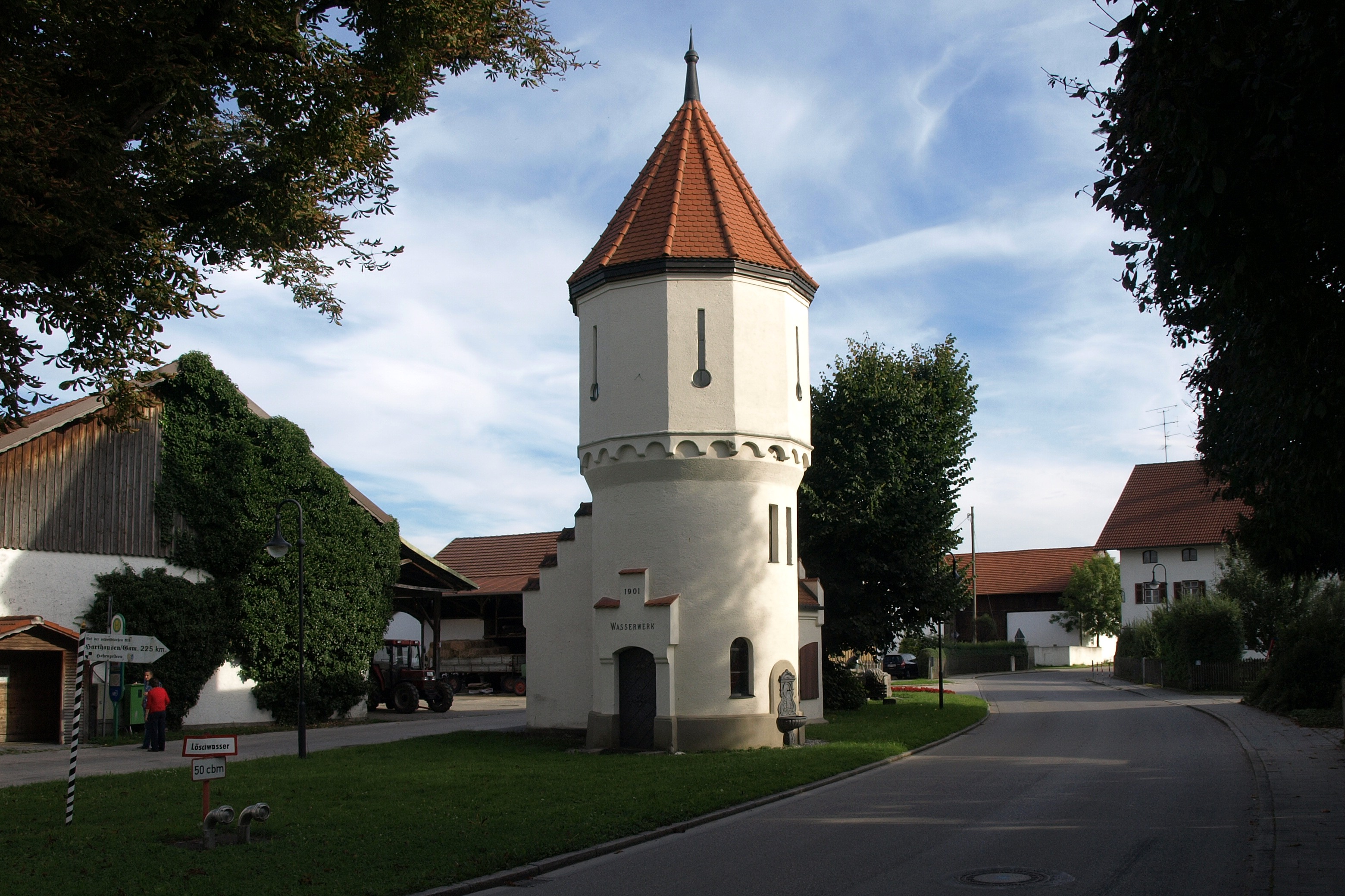 Grasbrunn / Harthausen mit Wasserwerk